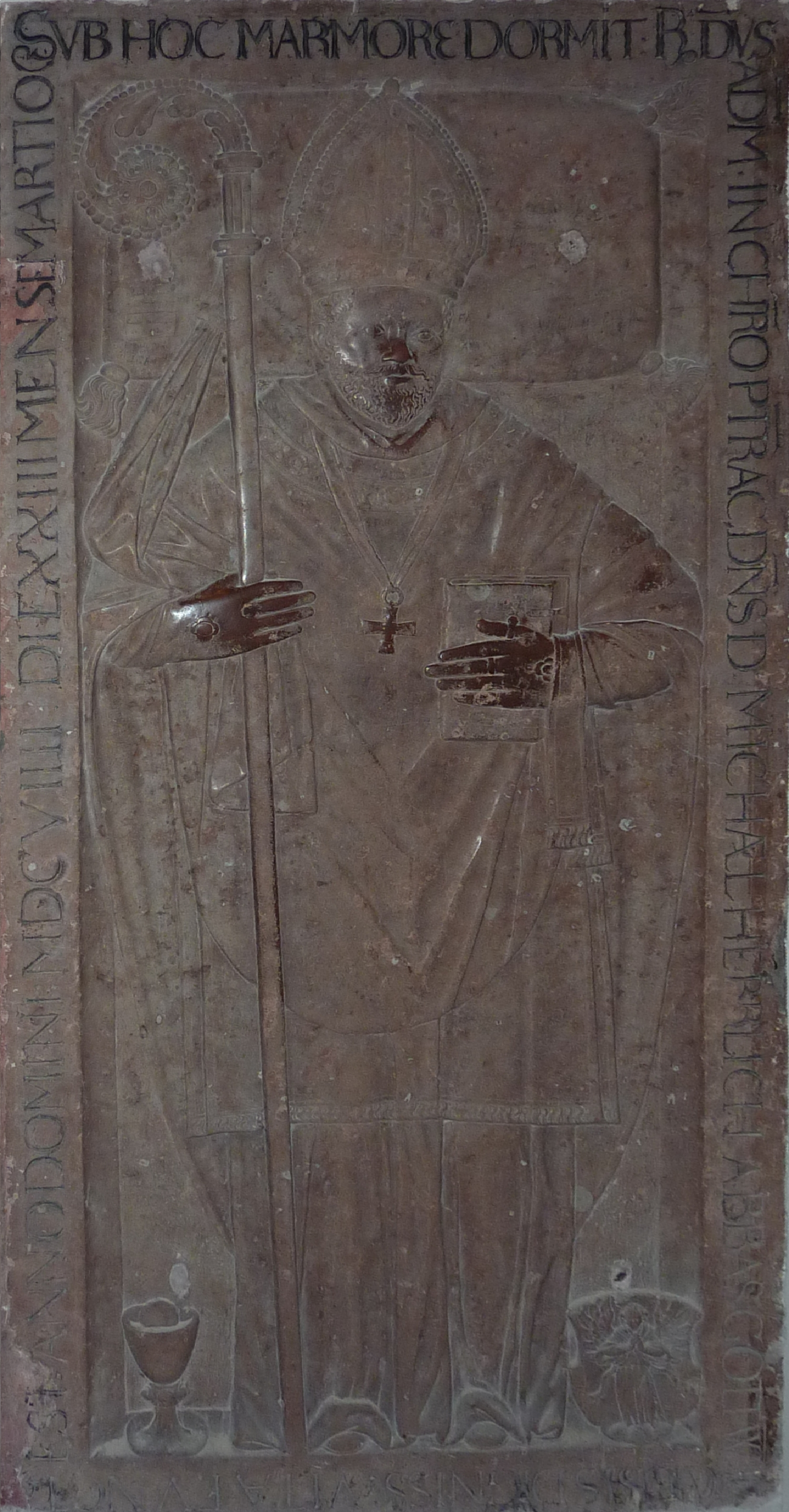 Grabplatte von Abt Michael Herrlich (um 1539 bis 1609; Abt von 1564 bis 1604) im Stift Göttweig, Vorhalle der Stiftskirche